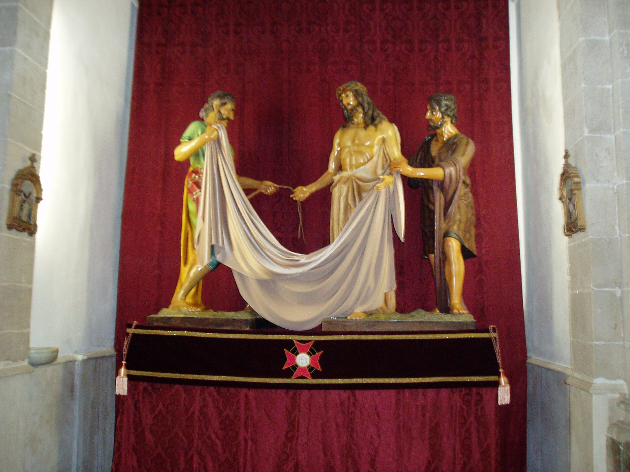 Pas de la Setmana Santa de Palma